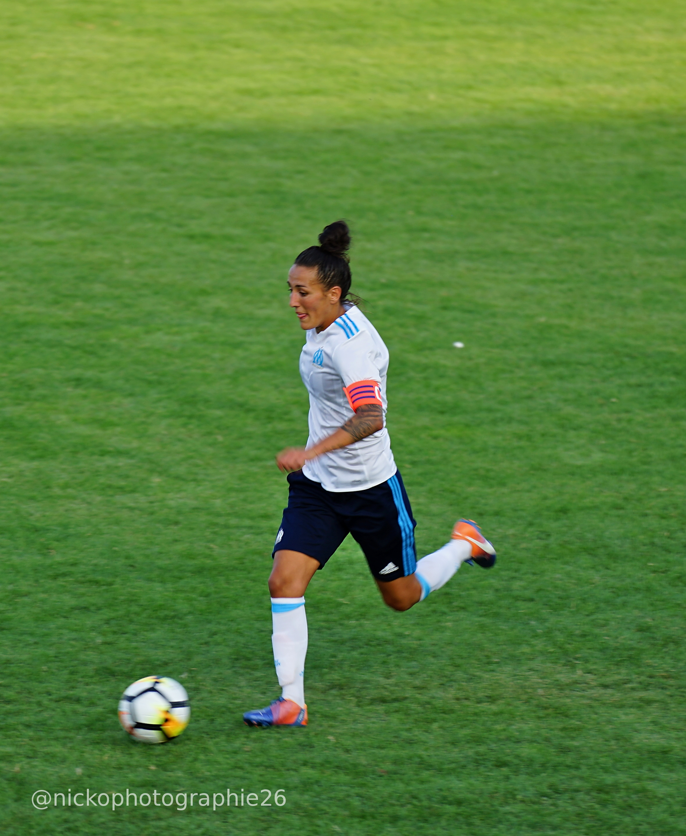 Kelly Gadea lors de OM ASSE en match amical